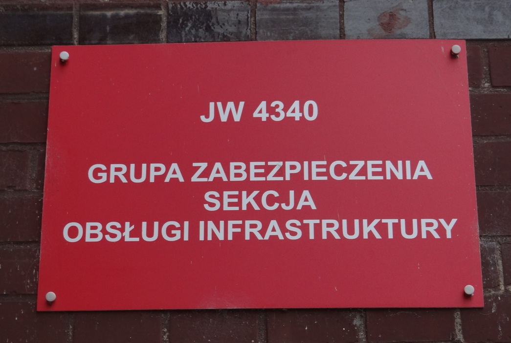 Tablica informacyjna - JW 4340 Grupa Zabezpieczenia, Sekcja Obsługi Infrastruktury w Stargardzie Szczecińskim